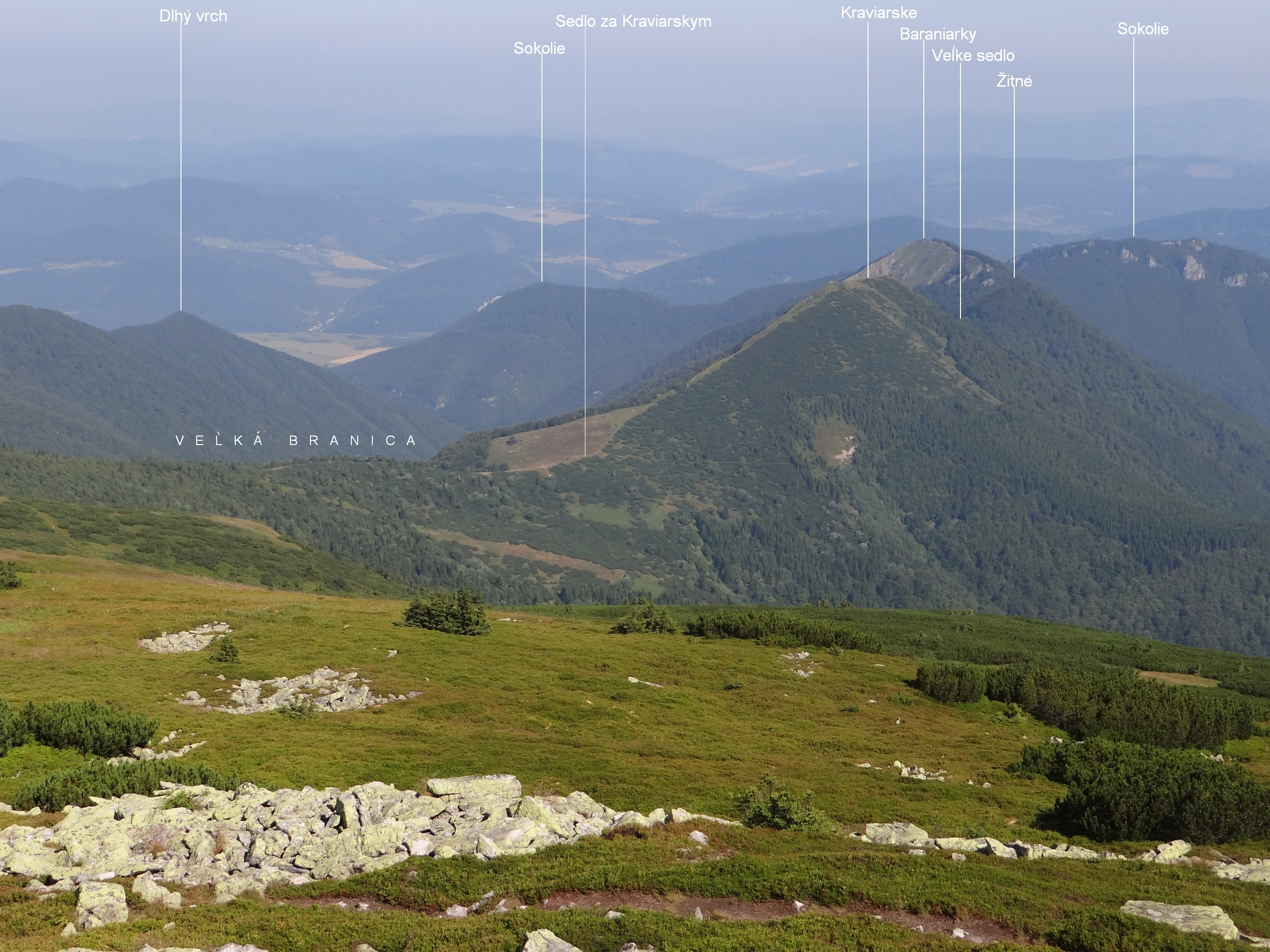 Widok z Wielkiego Krywania